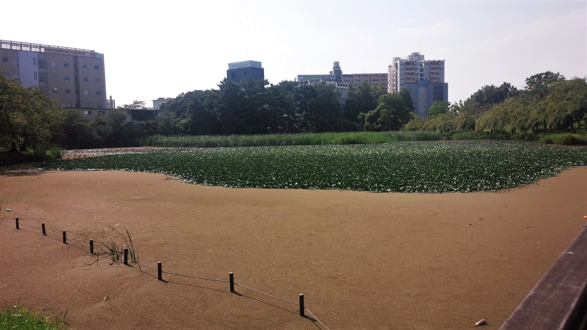 大阪府立大学中百舌鳥キャンパス 府大池の様子（大阪府堺市）